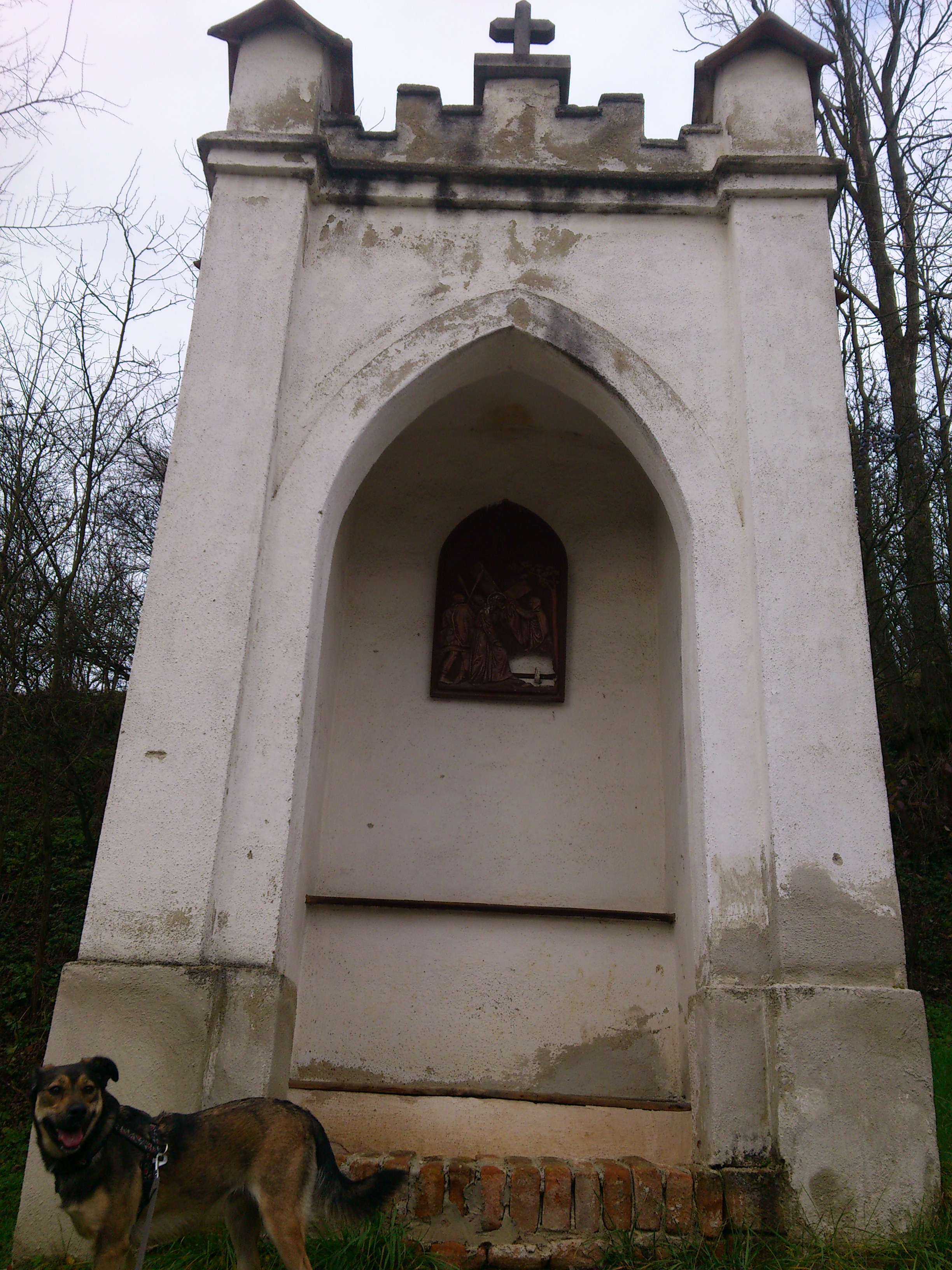 křížová cesta Nové hory, Nové hory